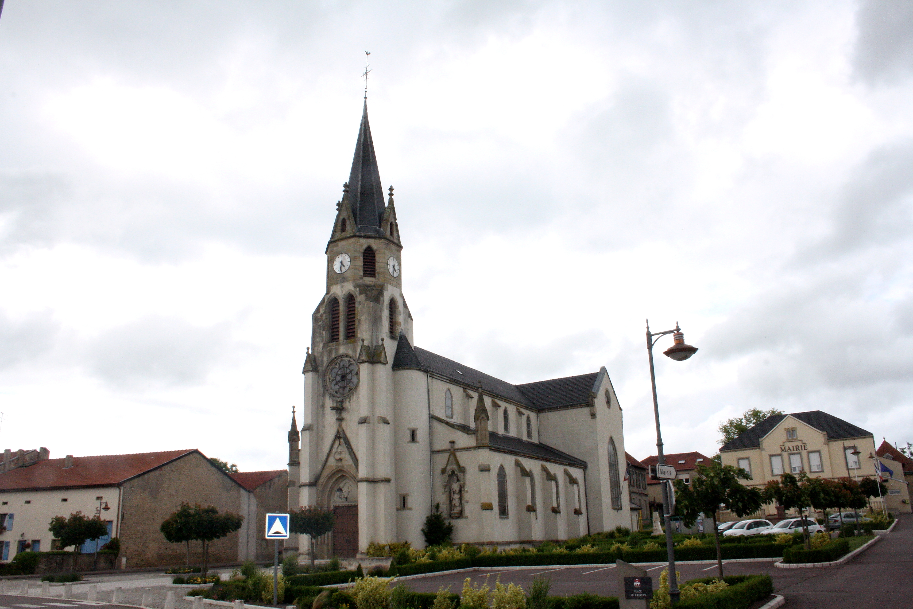 Eglise de style néo-gothique commencée en 1878 et bénie par l'évêque de Metz en 1879.